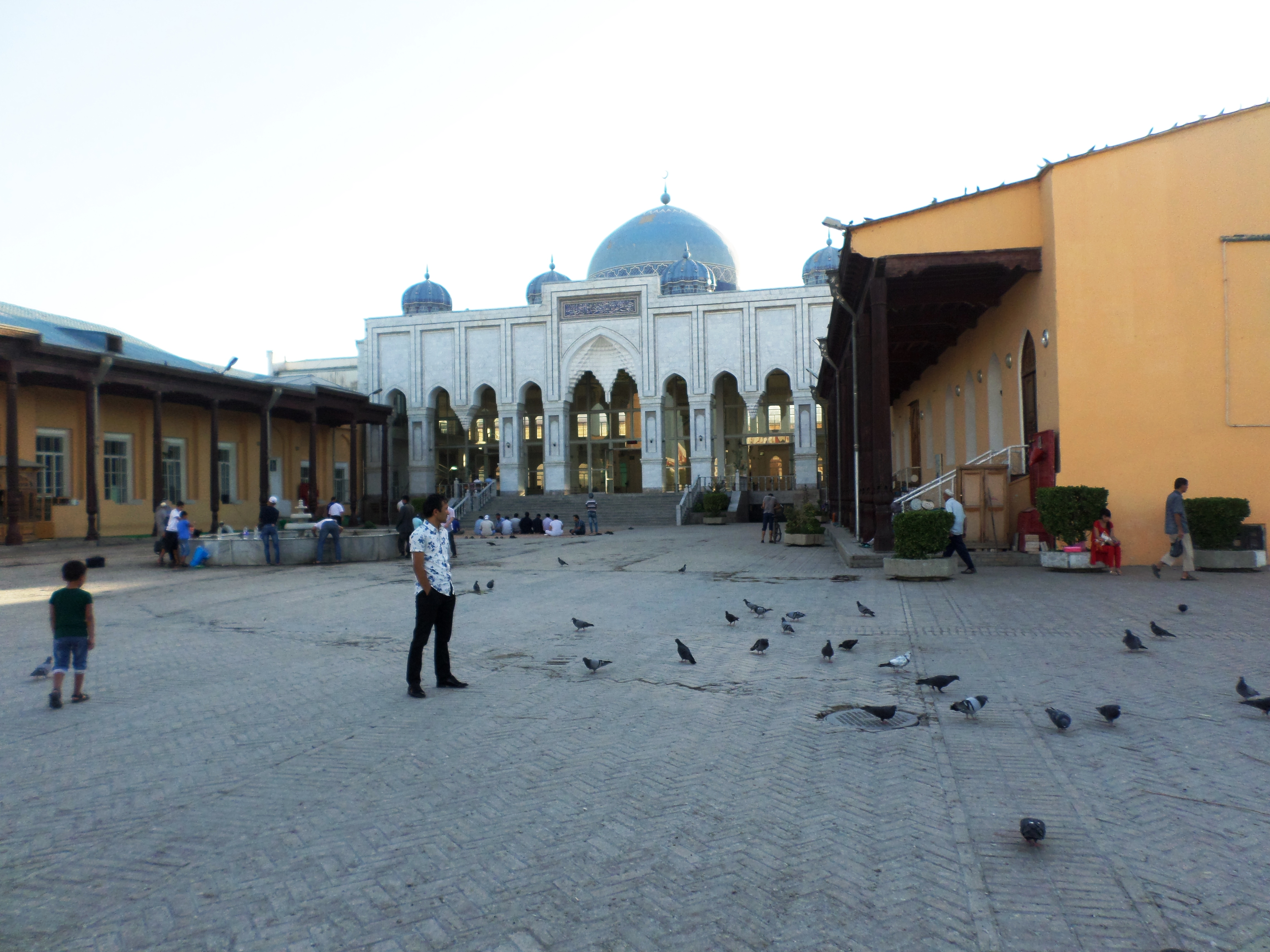 Площадь, мечеть-мавзолей шейха Муслихиддина (XVII—XVIII вв.), г. Худжанд